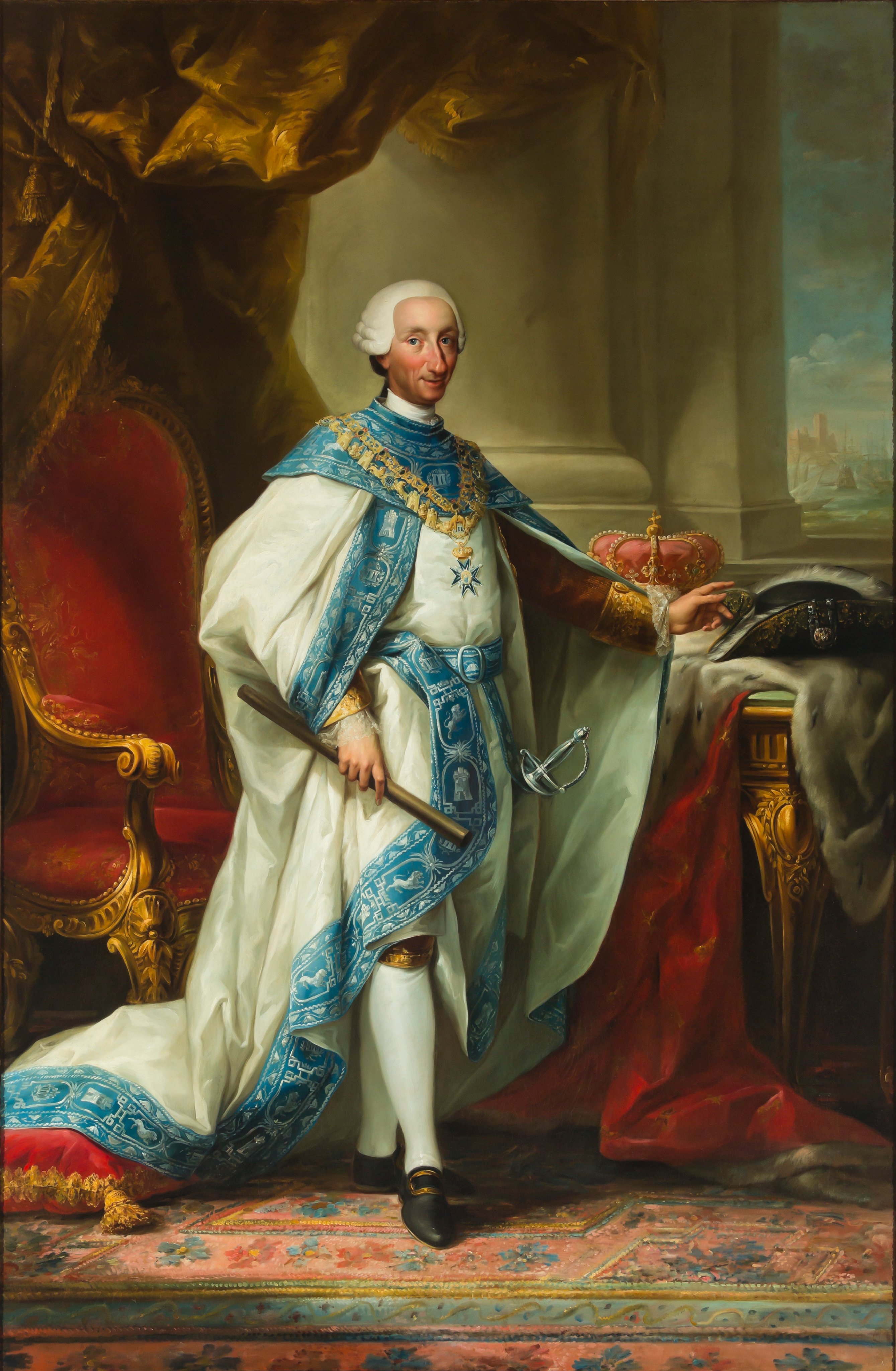 Retrato del rey Carlos III de España (1716-1788), revestido con el hábito de la Orden de Carlos III, creada por el mismo monarca en 1771.